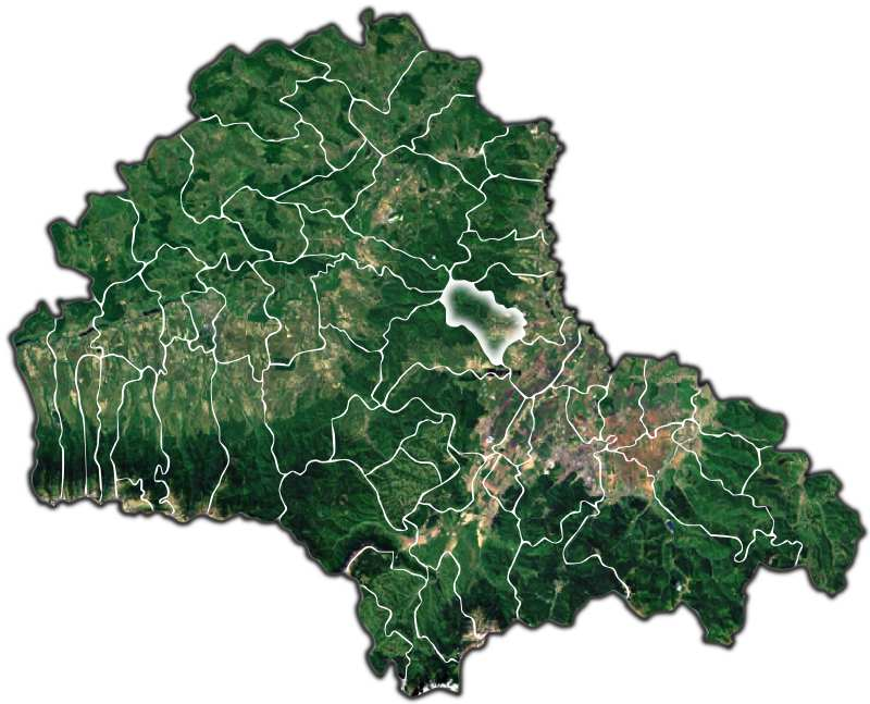 Crizbav jud Brasov